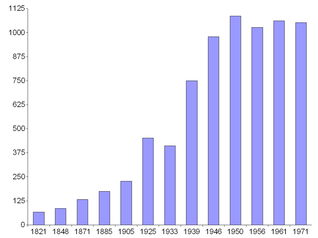 Einwohnerentwicklung Osterbrocks zwischen 1821c und 1871.